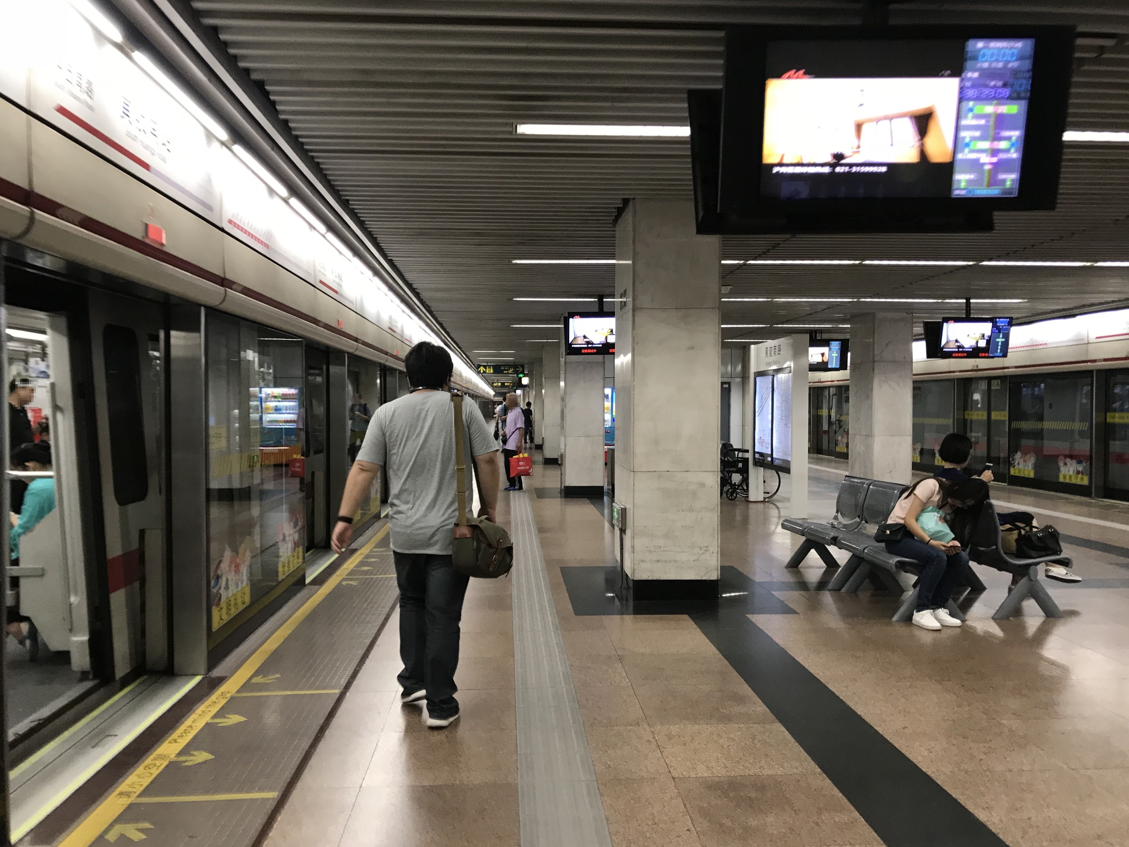 黄陂南路駅のホーム